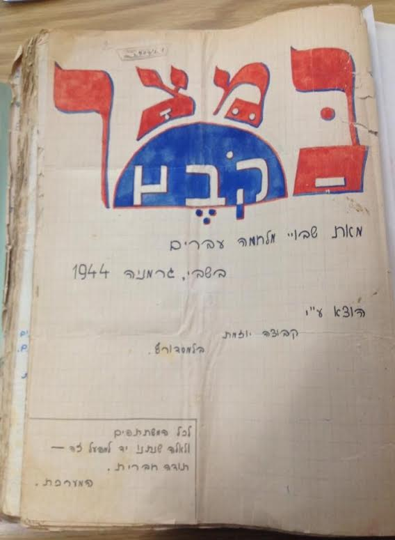 עיתון שפורסם בשבי